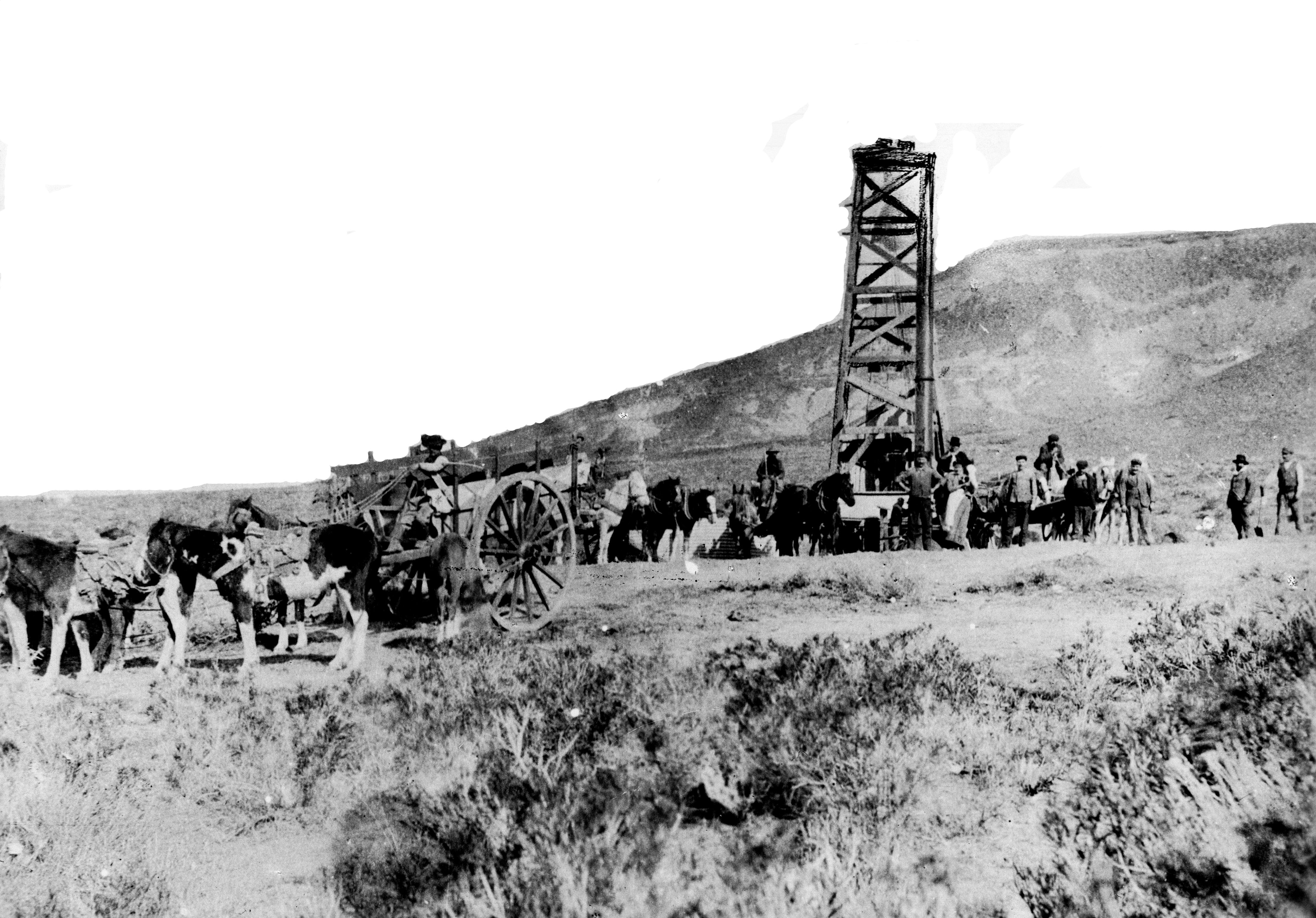 Primer pozo de petróleo en Comodoro Rivadavia, descubierto en 1907. Inventario 45883 General Archive of the Nation (Argentina) Native nameArchivo General de la Nación ArgentinaLocationBuenos Aires, ArgentinaEstablished28 August 1821WebsiteAGNAuthority control : Q2860529 This file, was provided to Wikimedia Commons thanks to an agreement between the General Archive of the Nation of Argentina and Wikimedia Argentina.